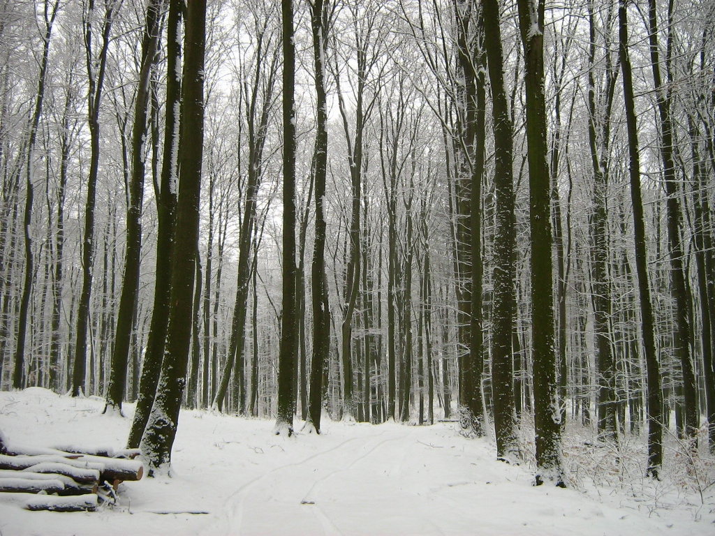 Boitzenburger Wald (Landkreis Uckermark, Brandenburg).